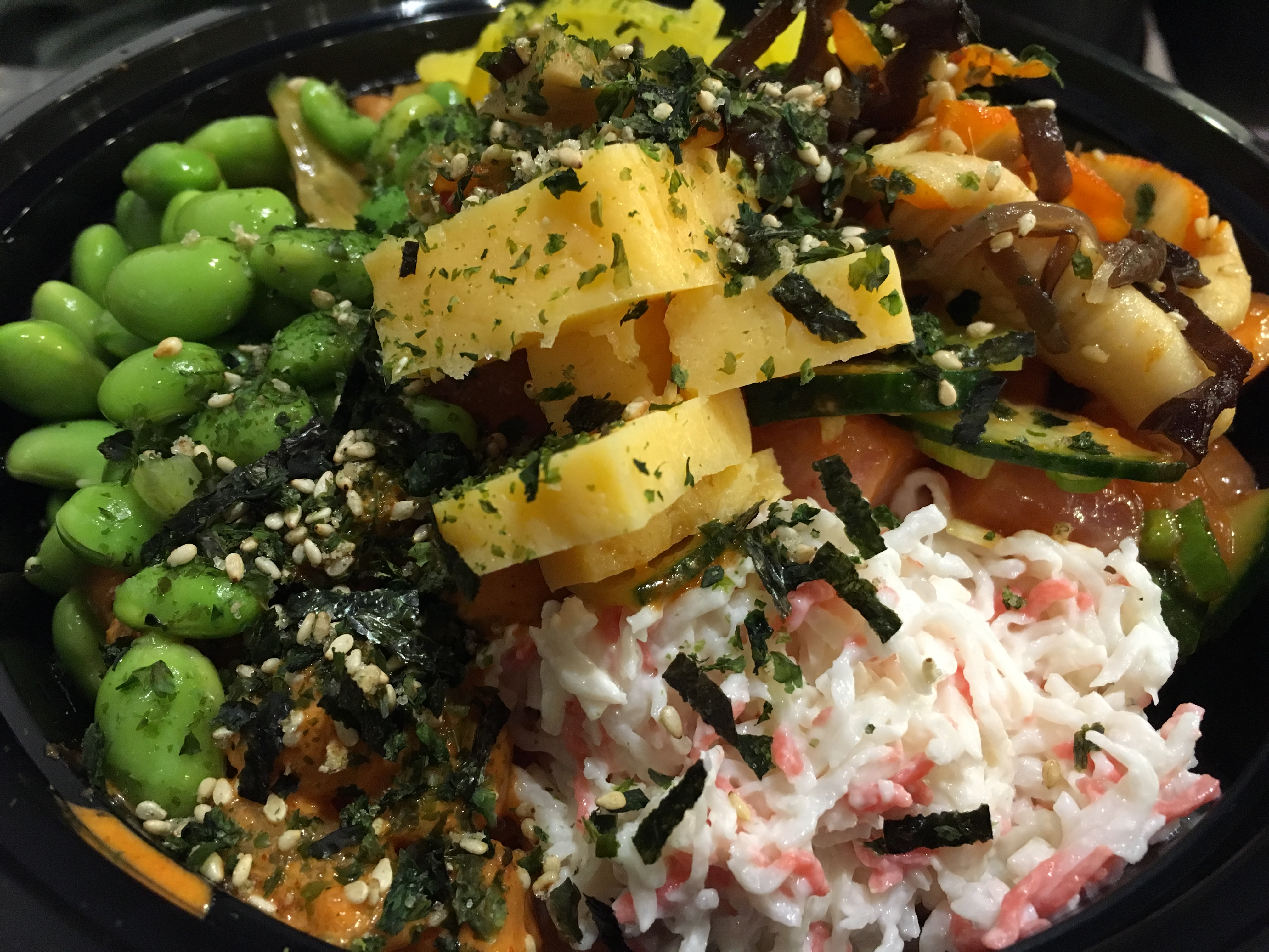 Chirashizushi